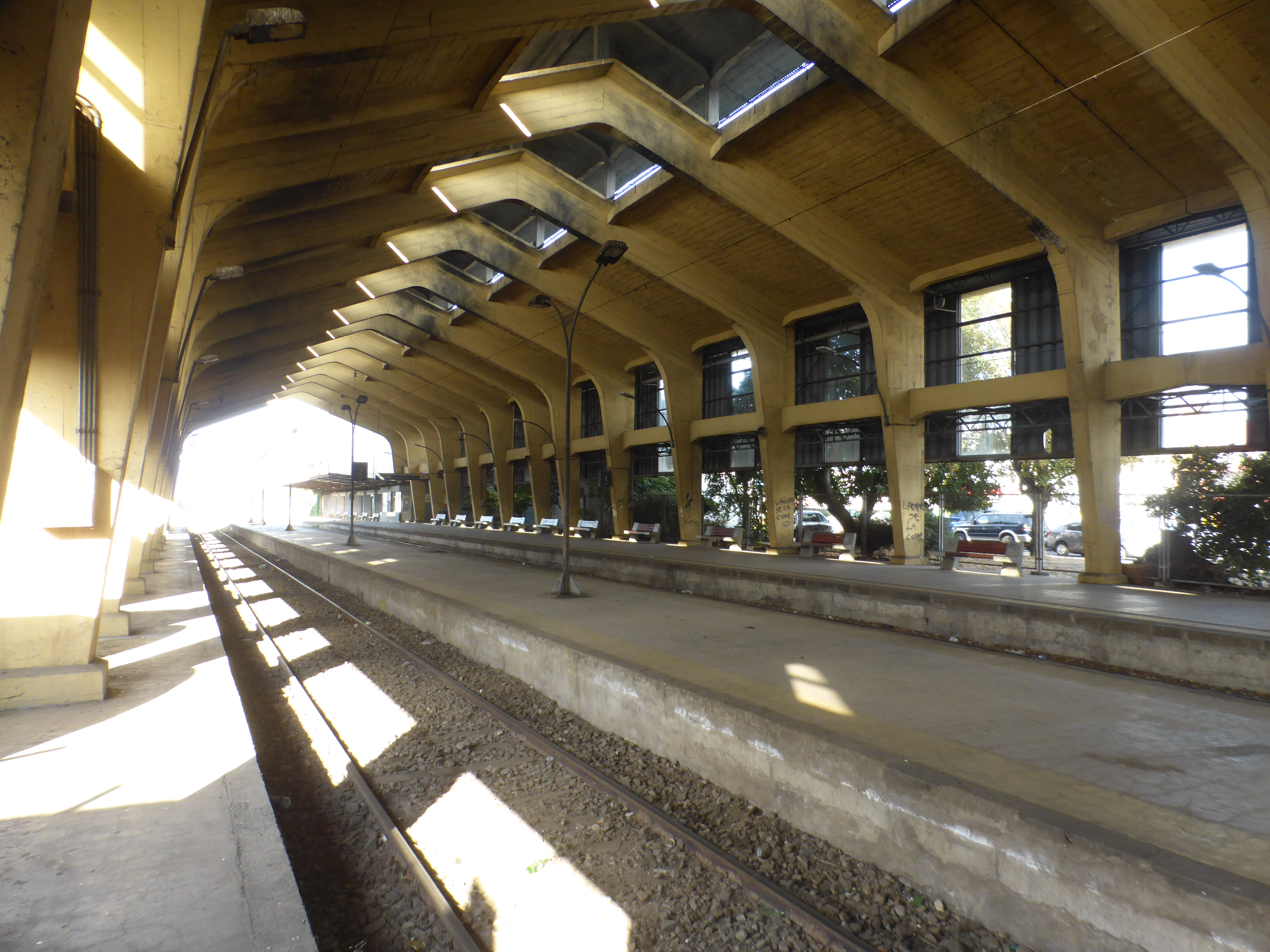 Estación terminal del servicio diario entre Victoria y Temuco.